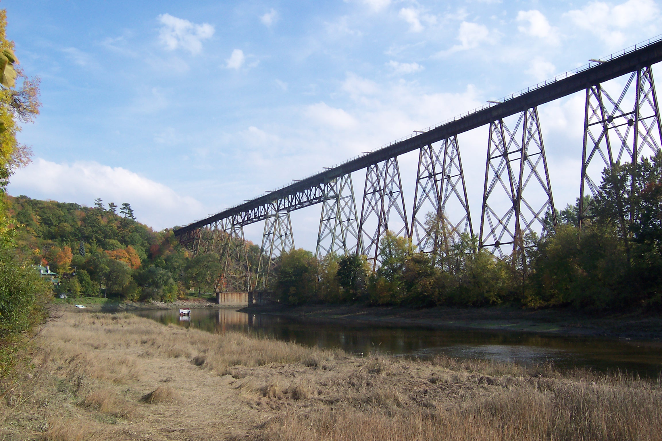 Le tracel (pont de chemin de fer) de Cap-Rouge vu des berges de la rivière Cap-Rouge, en direction est.